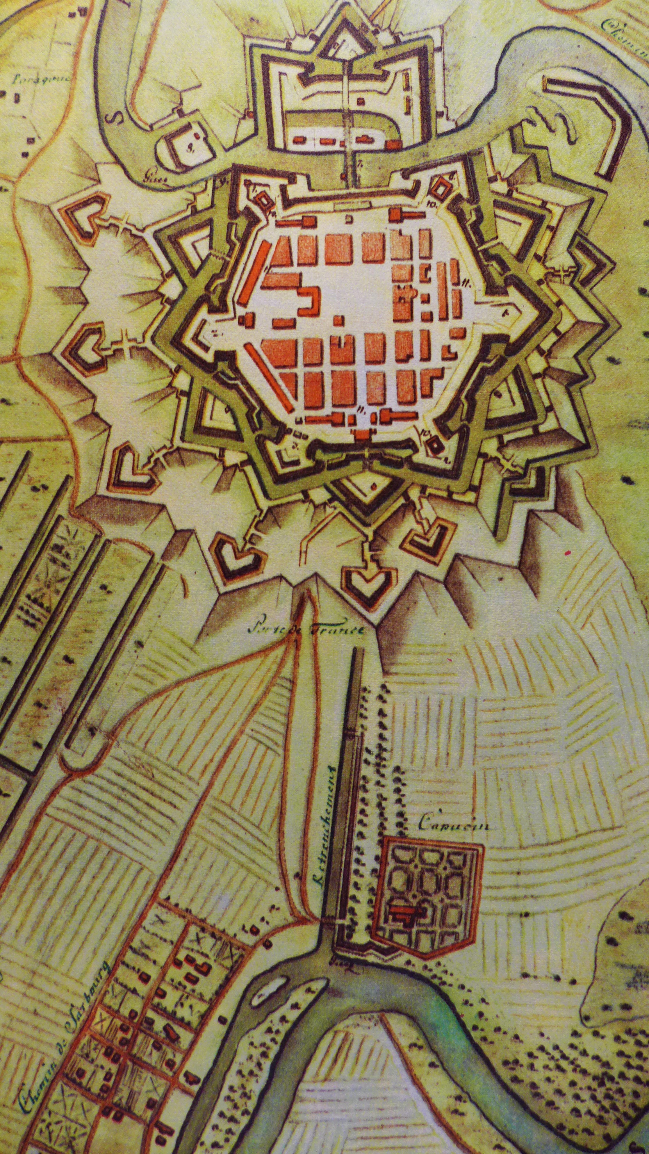 Plan de Sarlouis et de la Situation, Karte um 1740 mit dem von Wallerfangen nach Saarlouis verlegten Kapuzinerkloster (Stadtarchiv Saarlouis)